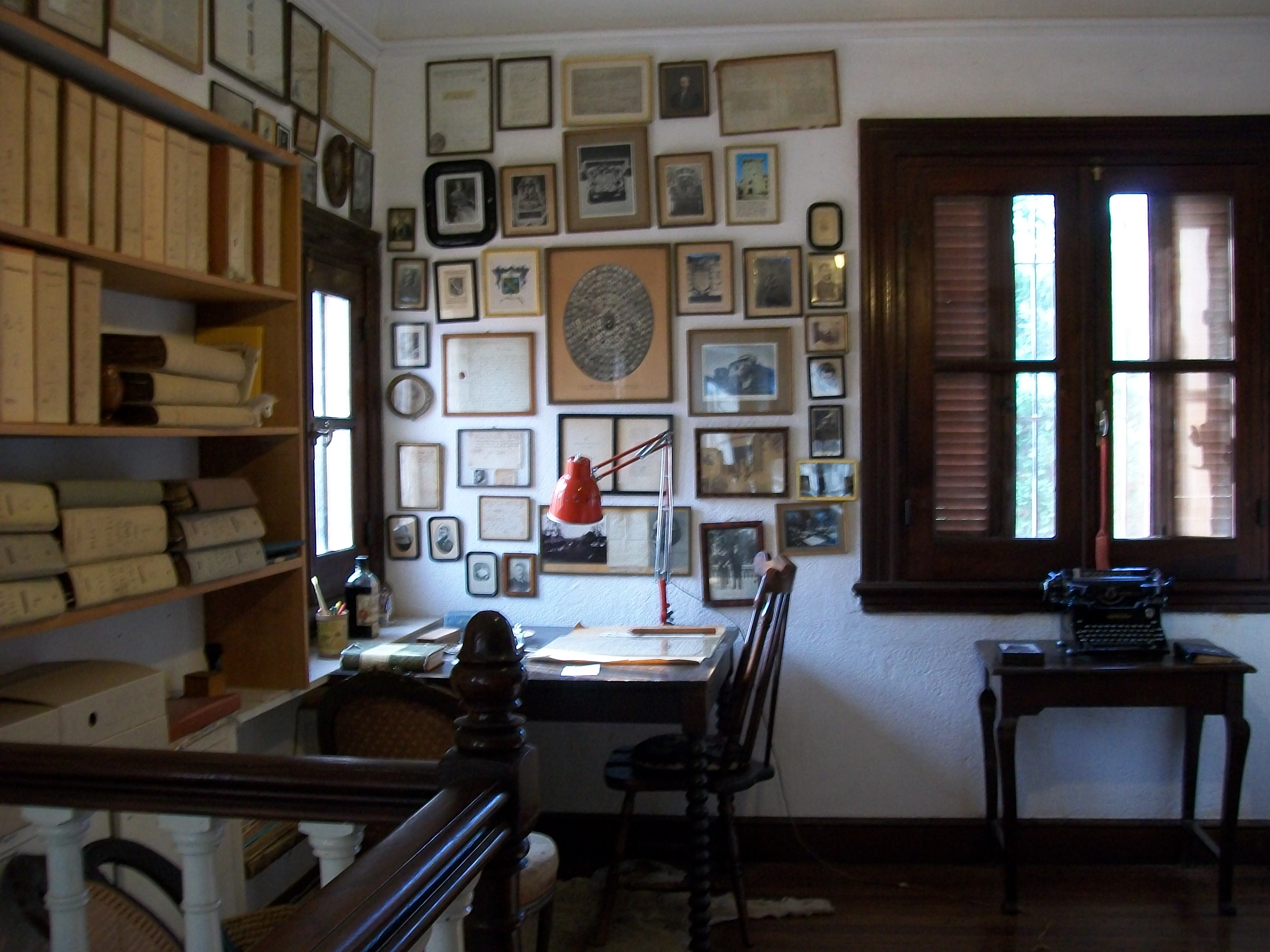 Casa de Manuel Mujca Láinez en Cruz Chica, La Cumbre, Córdoba, Argentina. Escritorio de la casa donde trabajaba MML.